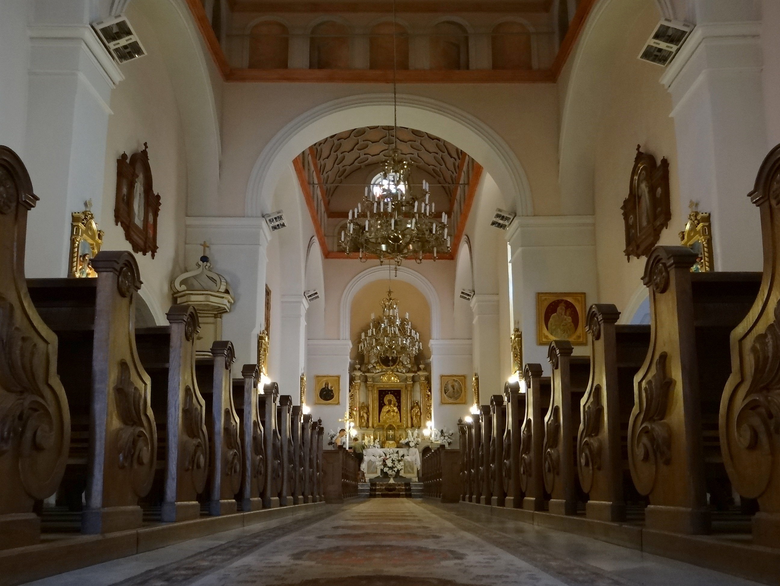 Widok na ołtarz główny 5